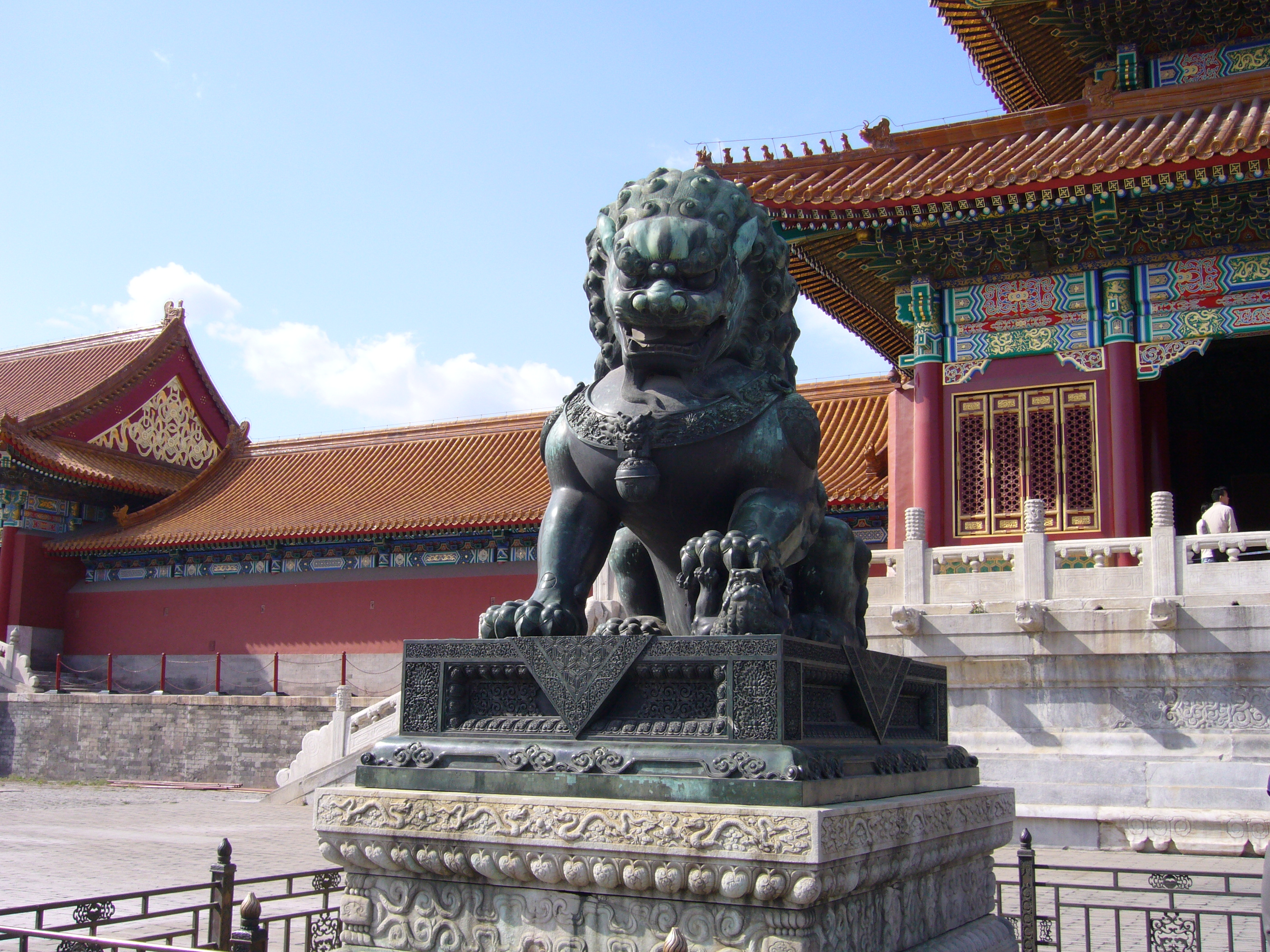 Tempelleeuwin in de Verboden Stad in Beijing